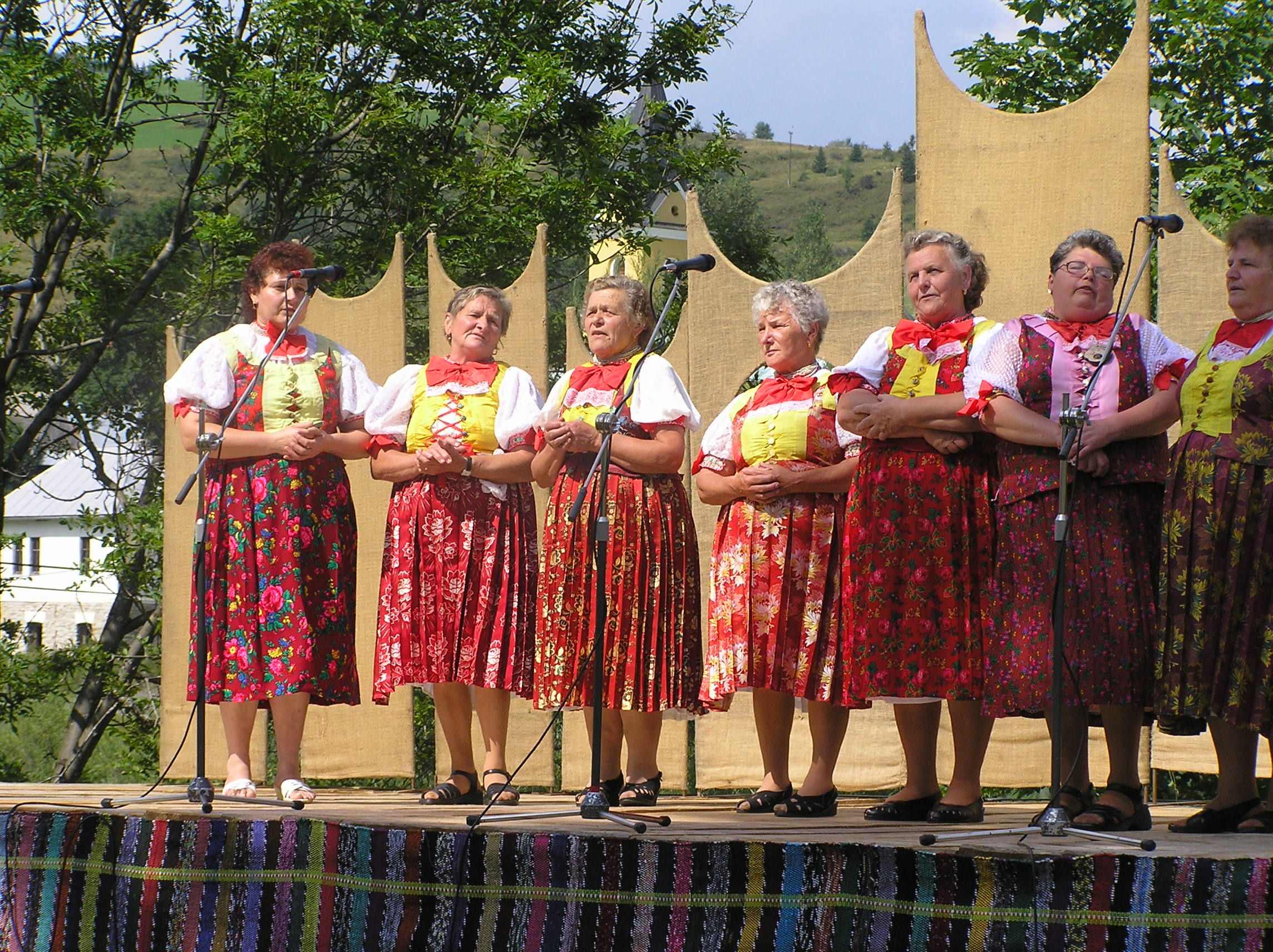 Veľké Borové, ženy z obce spievajú na folklórnom festivale amatérskych hudobníkov Letokruhy